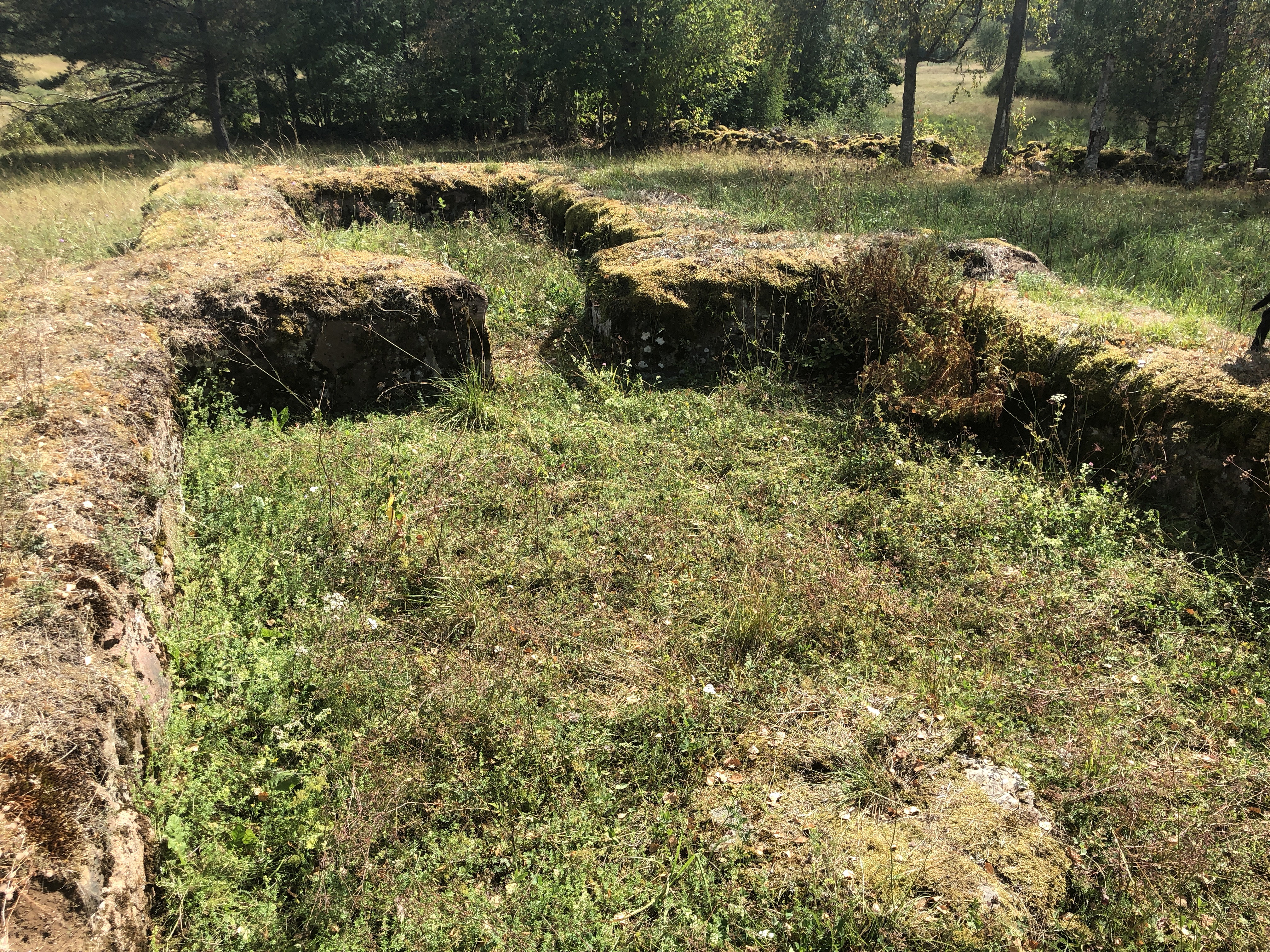 Ballstorps kyrkoruin med fundamentet till dopfunten synlig längst ned i bild.